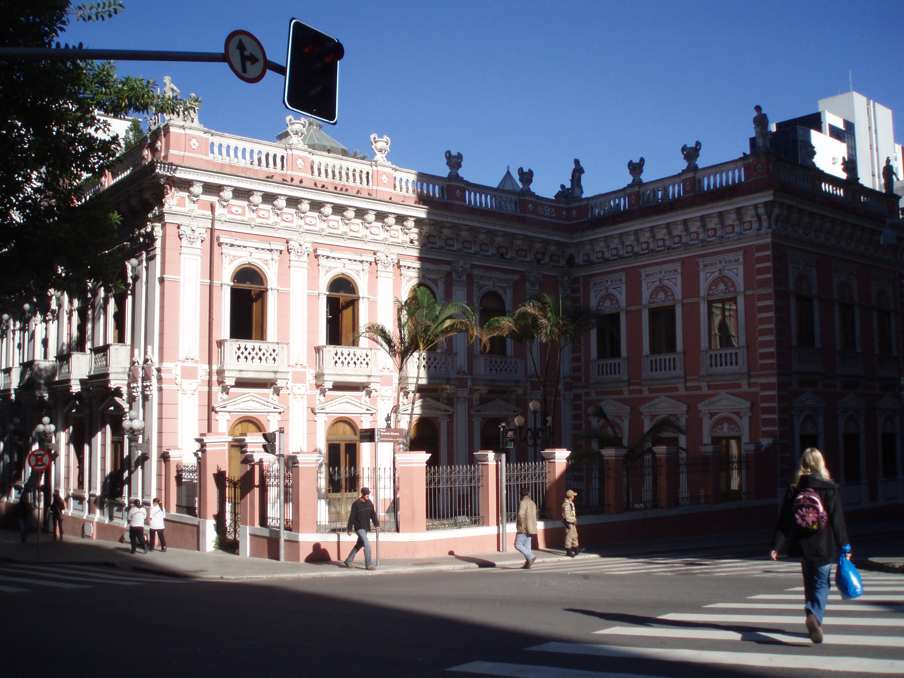 Façade du palais Cruz e Sousa, Florianopolis, Brésil